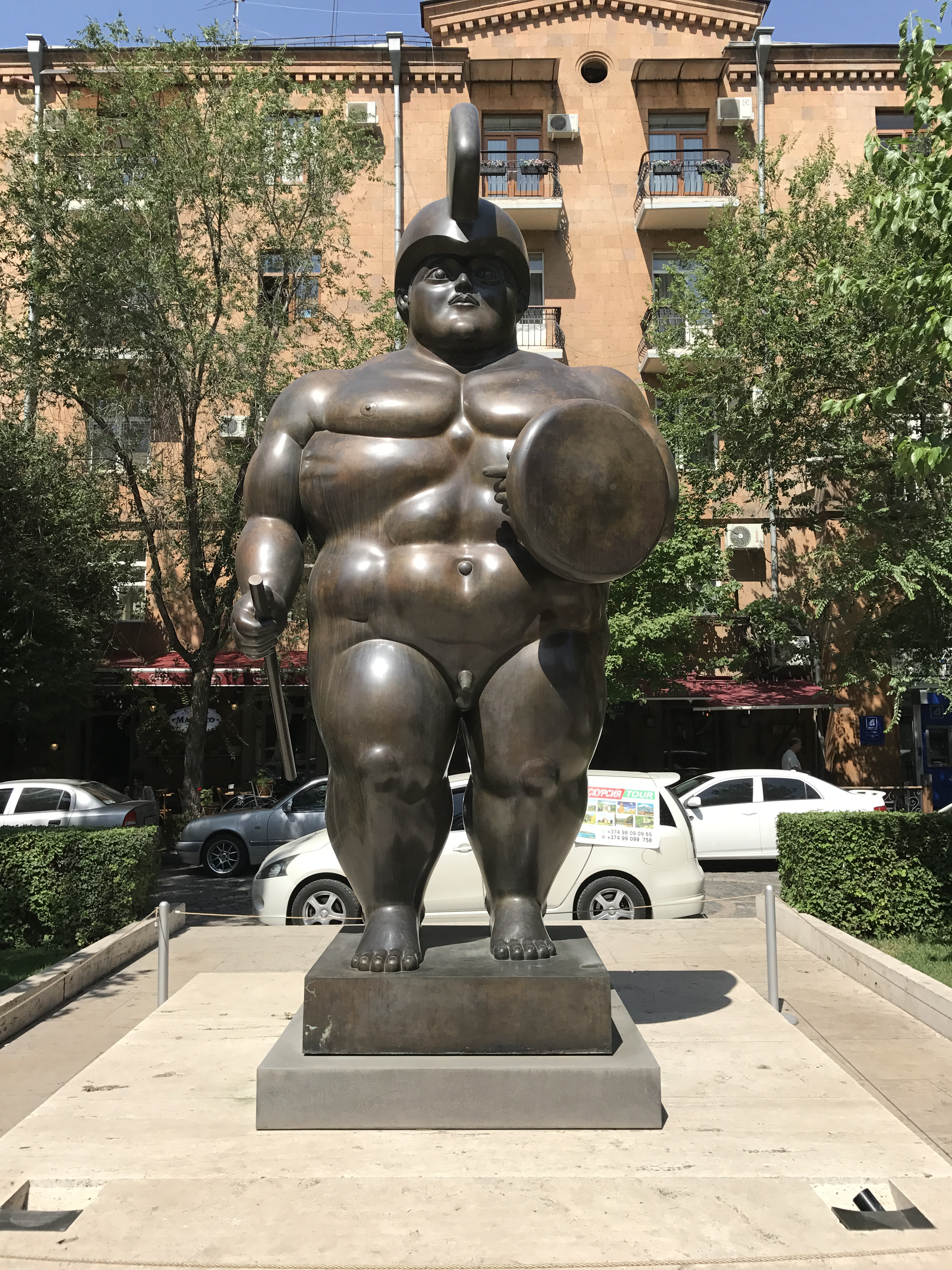 Art public, rue Tamanian, Erevan, 2017.